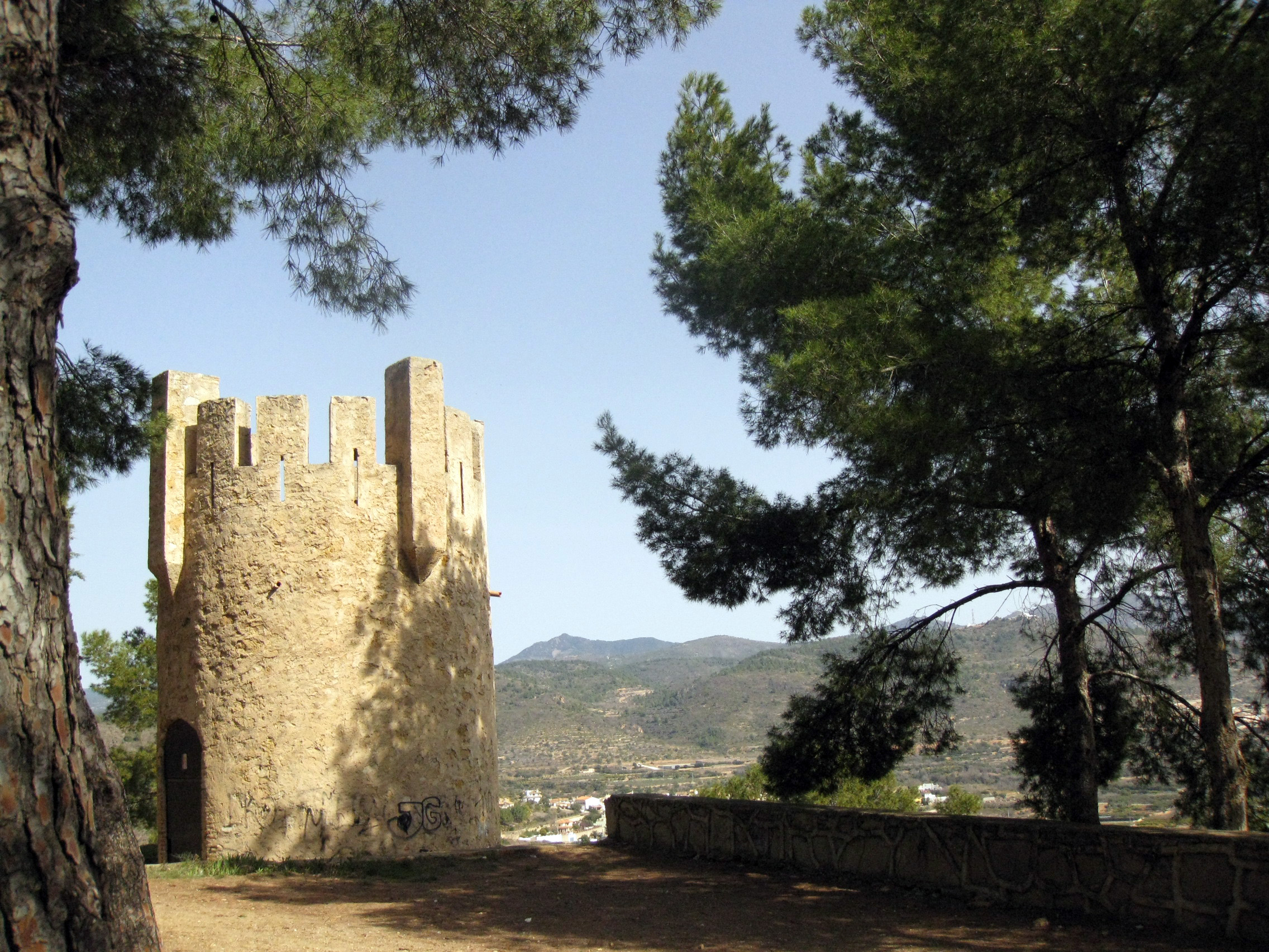 Torre_del_castell_de_La_Estrella_(Sogorb)